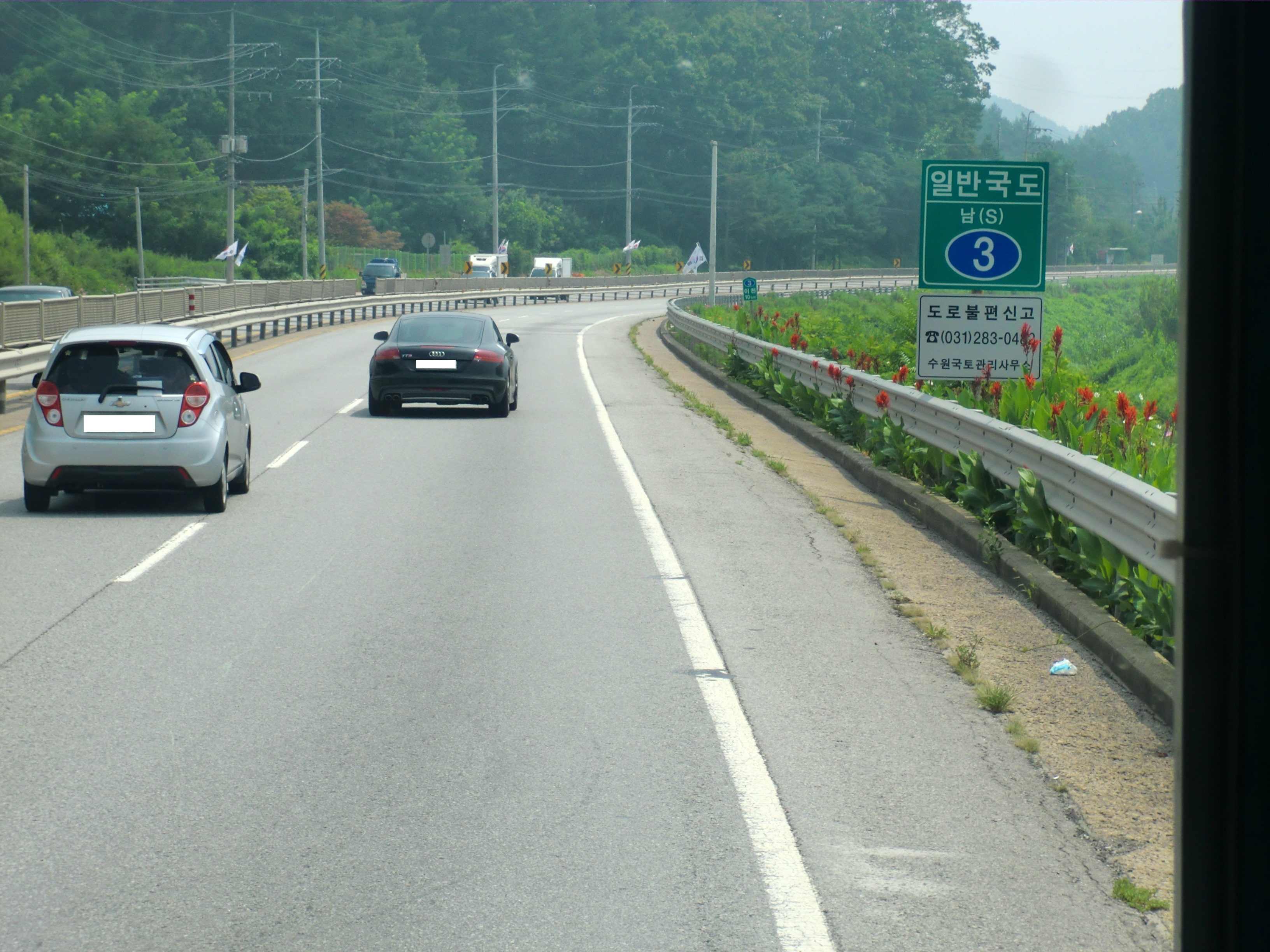 국도3호선 경기도 광주기 초월읍 부근